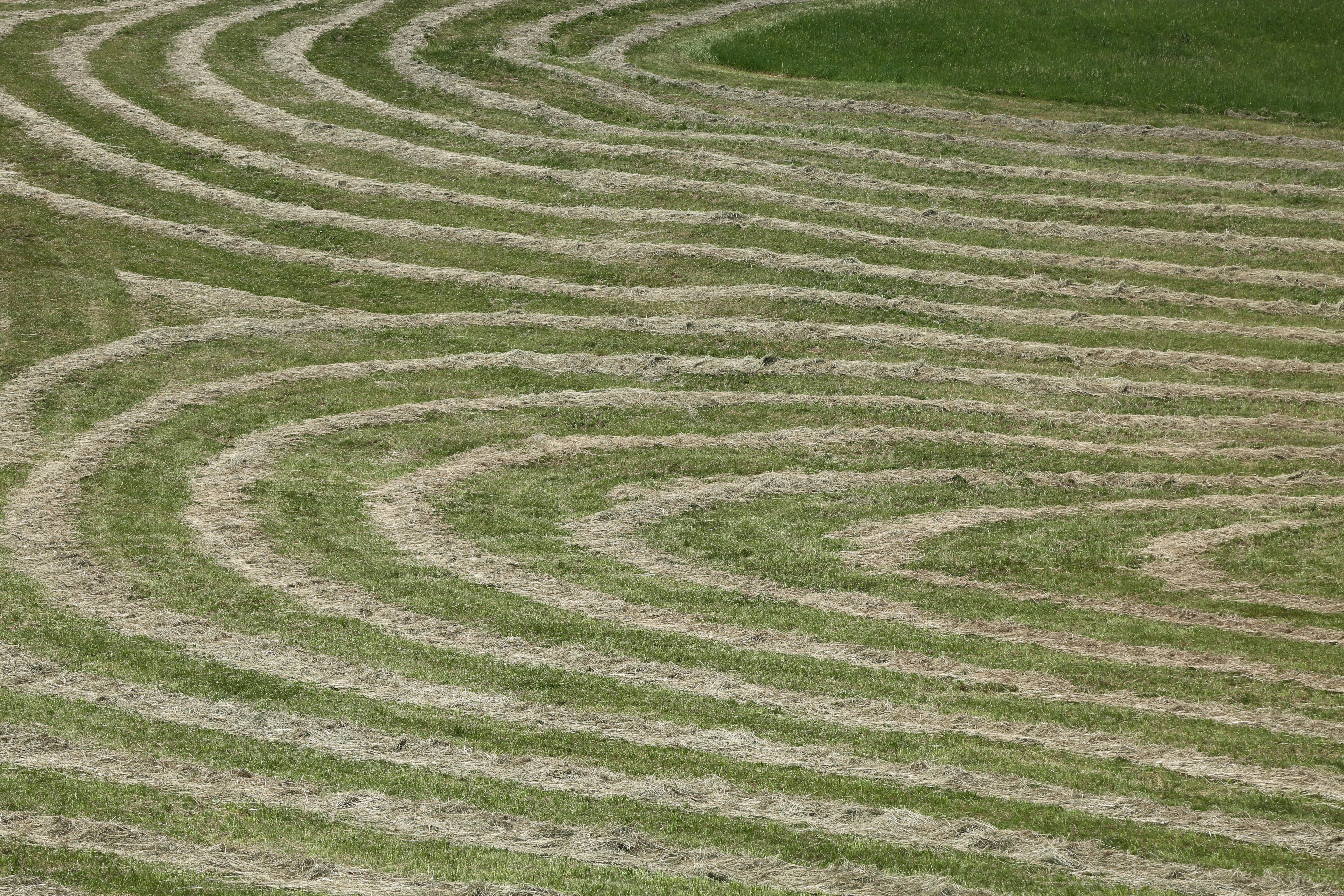 Schwaden auf einer Wiese im Landkreis Weilheim-Schongau